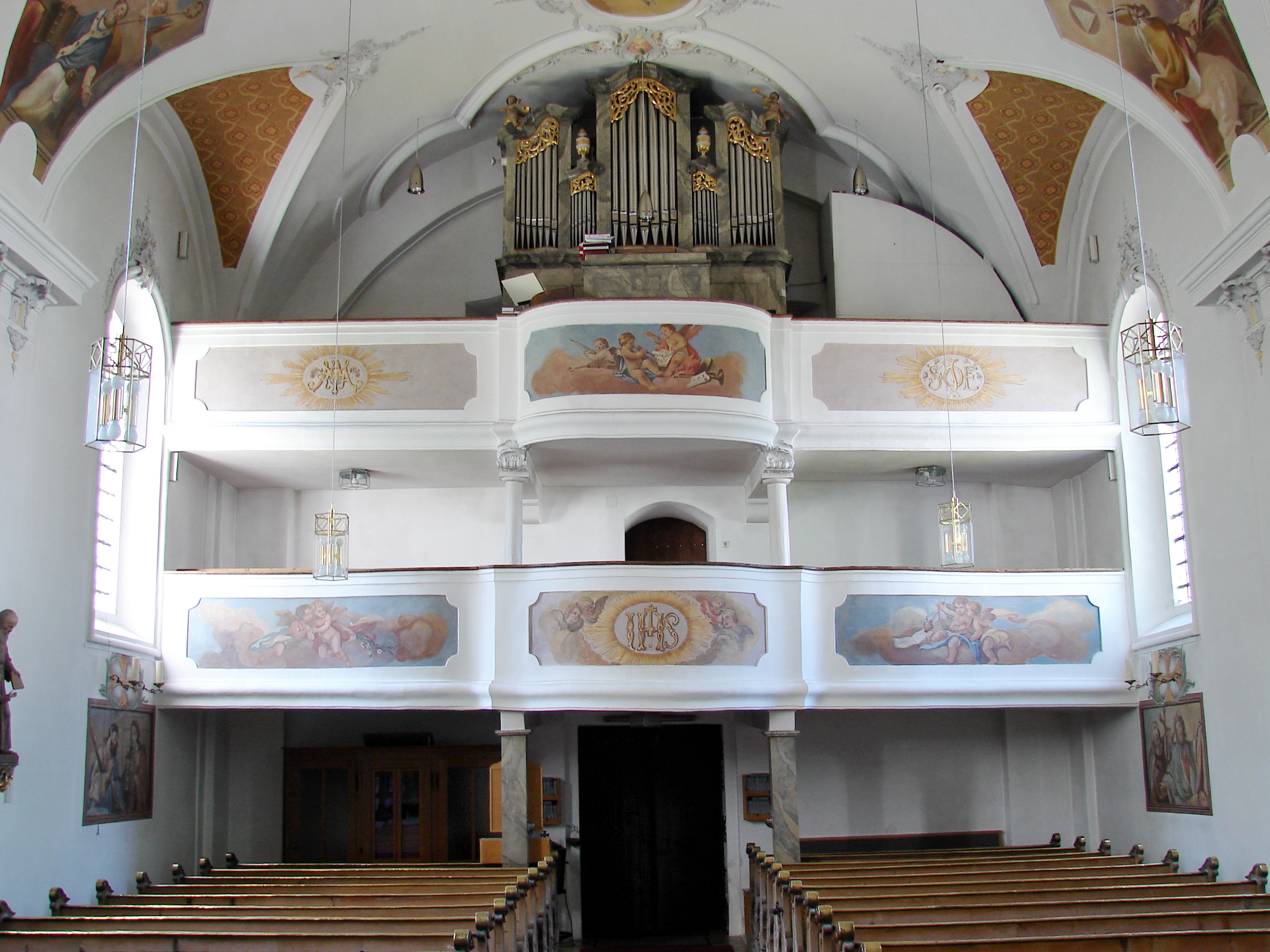 Unterneuhausen